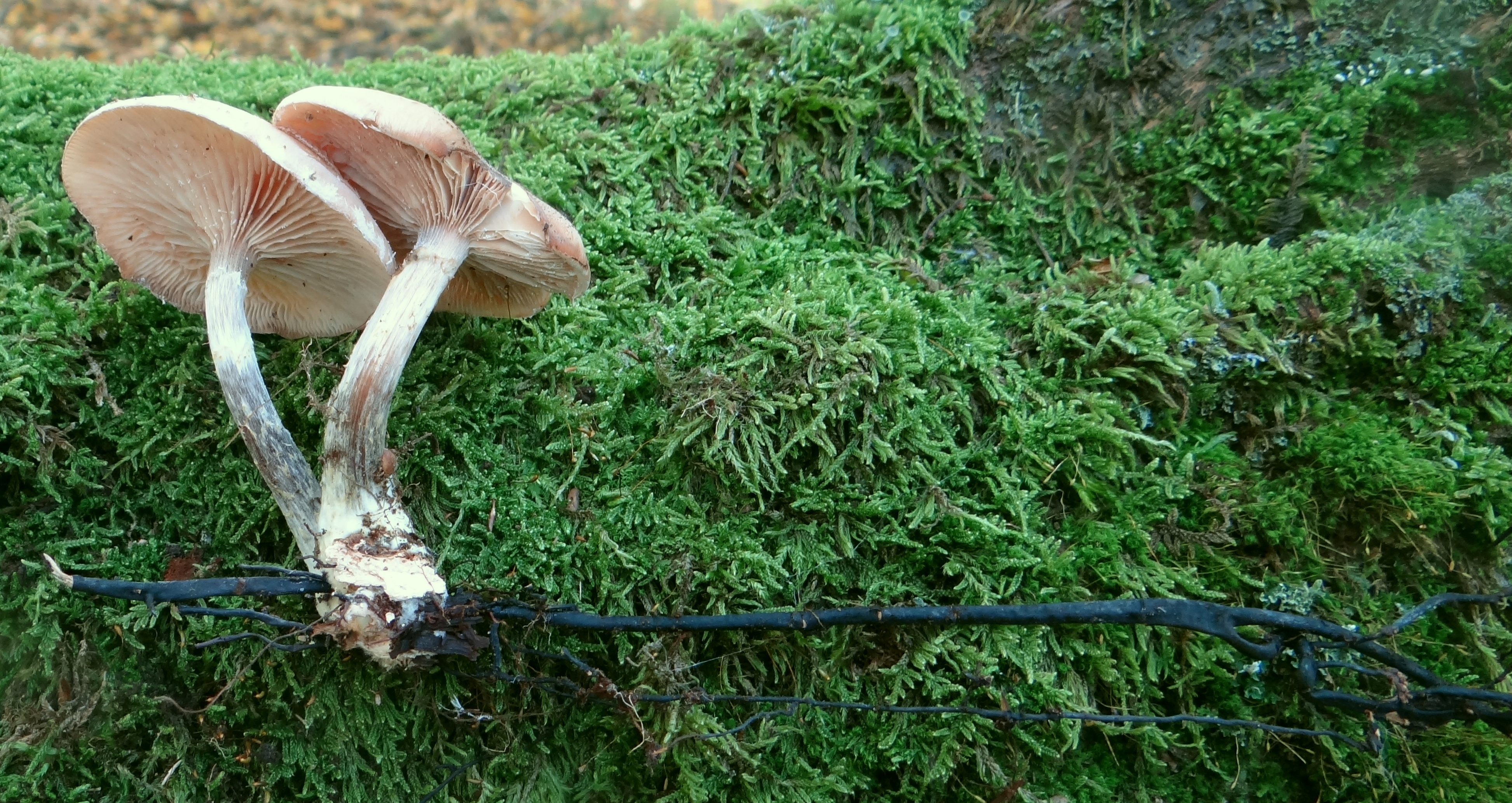 Armillaria sp. rhizomorph. Location: Poland, Puszcza Niepołomicka